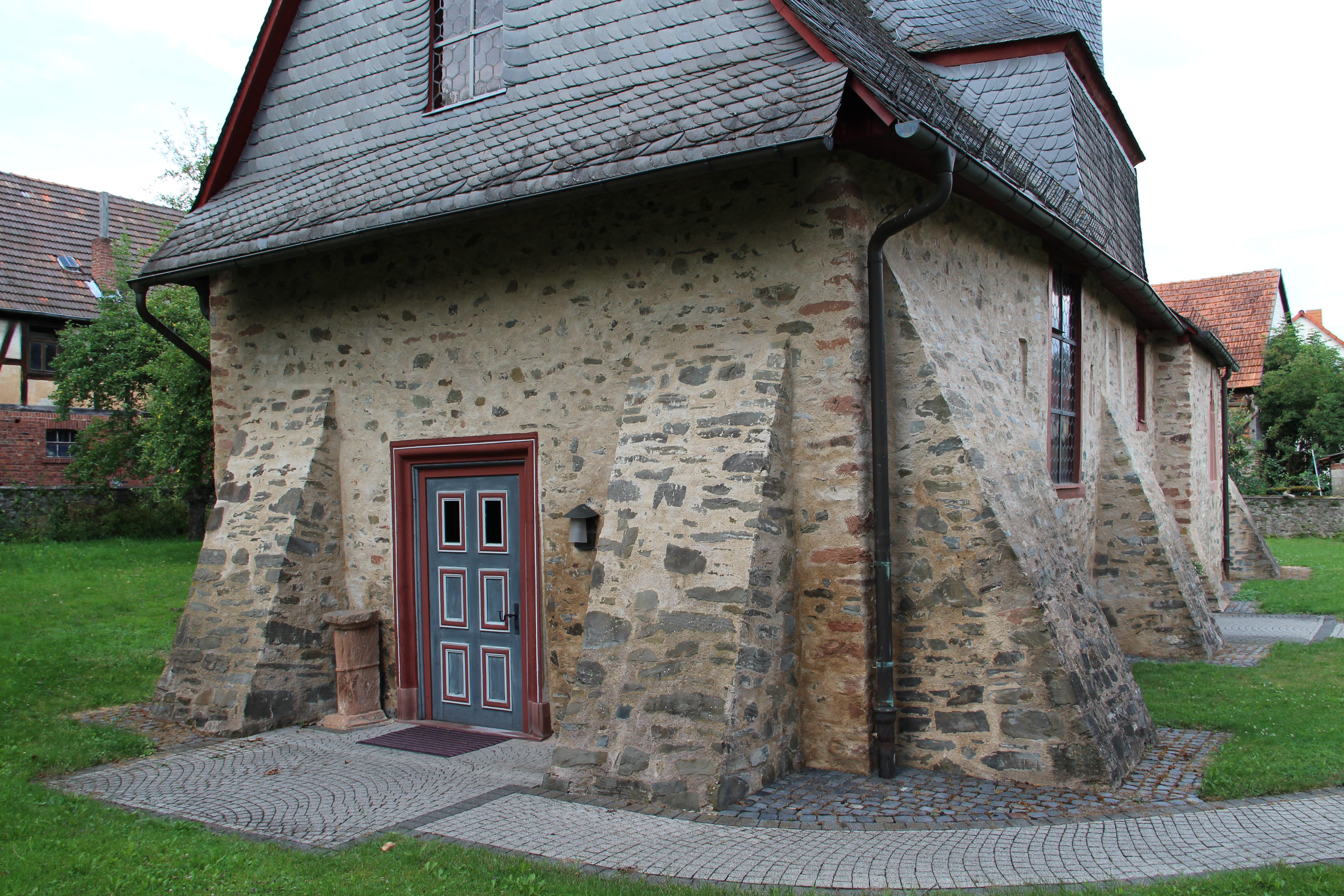 Ev Kirche Kirchvers (Lohra) - Ansicht von Südwesten